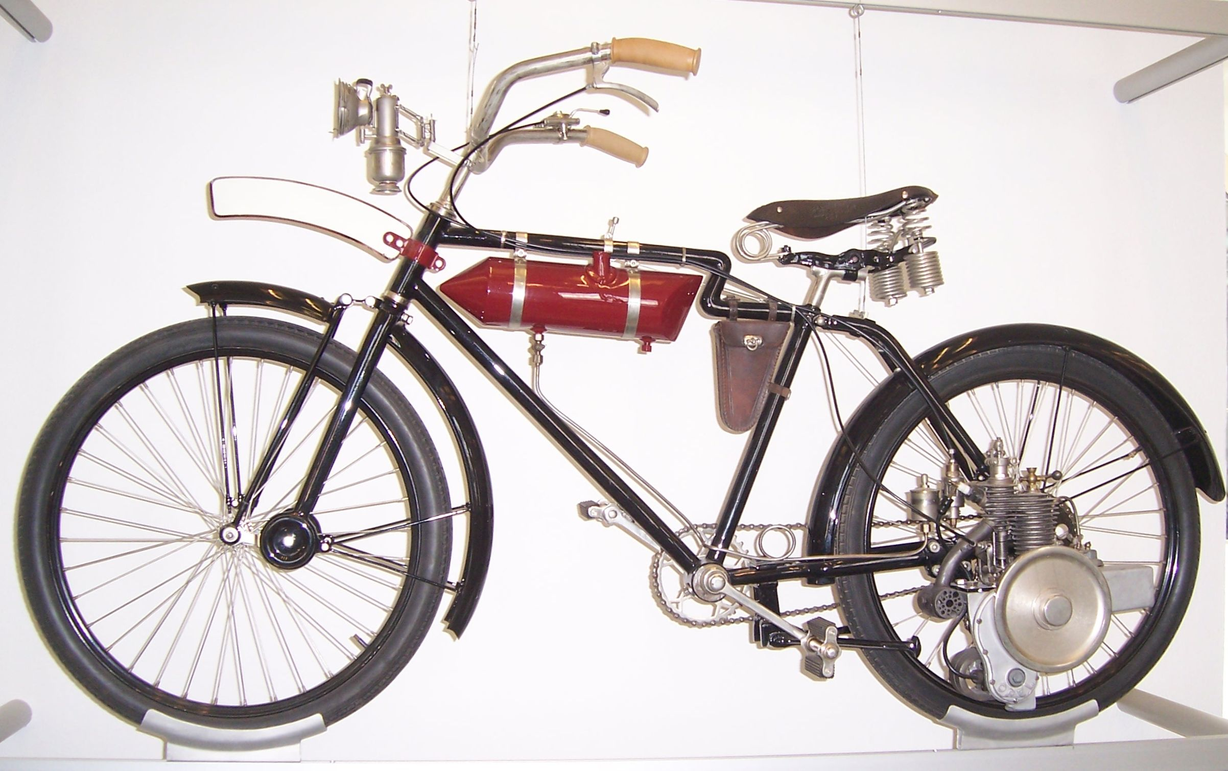 Herren-Motorfahrrad Opel im Verkehrsmuseum Dresden